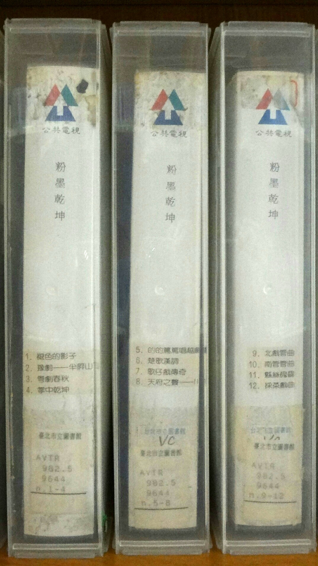 臺北市立圖書館西湖分館收藏的公共電視節目《粉墨乾坤》VHS錄影帶，頂端圖案為公共電視節目標誌。